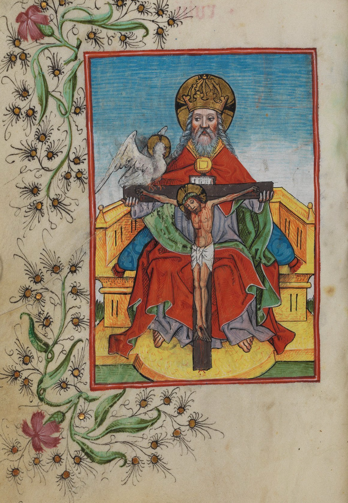 Illuminierte Seite aus dem Waldburg-Gebetbuch, WLB Stuttgart, Cod. brev. 12, fol. 19v